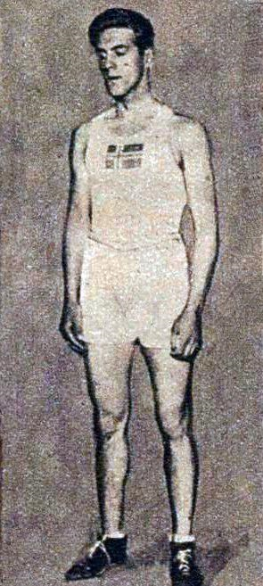 Le Norvégien Otto von Porat, champion olympique des poids lourds aux JO de 1924.